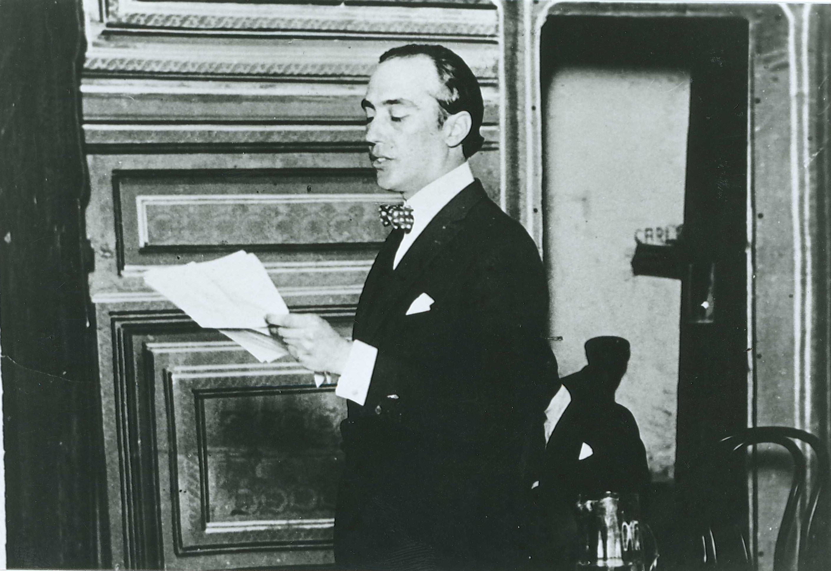 Deodoro Roca (1890-1942)